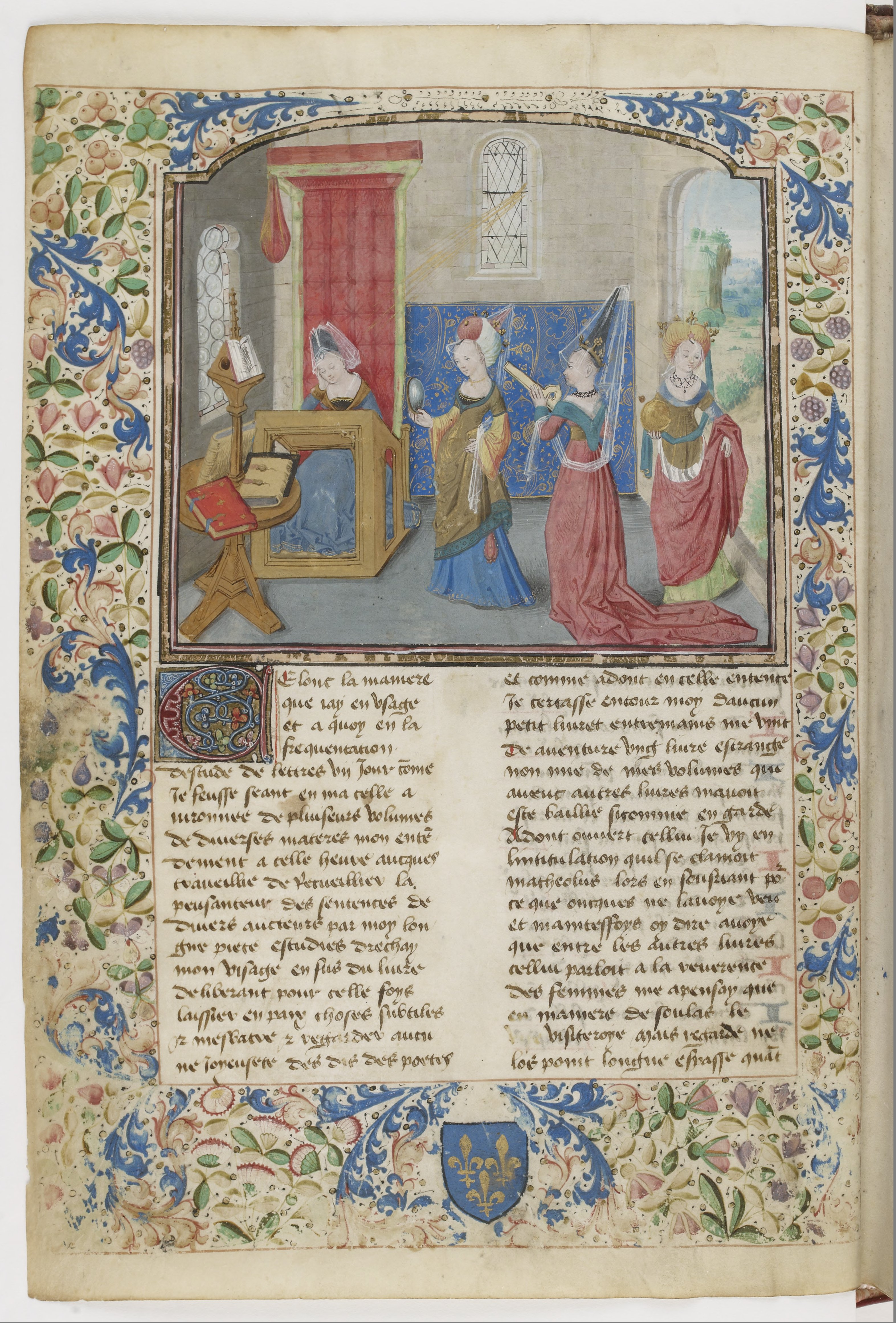 Livre de la cité des dames » [par CHRISTINE DE PISAN ]. BN Paris fr. 1177, Bl. 3v - Autorinnenbild mit Damen und Büchergestell